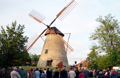 Sáfrik szélmalom, Kiskunhalas